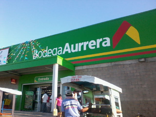 Nuevo Bodega Aurrera Hipermercado